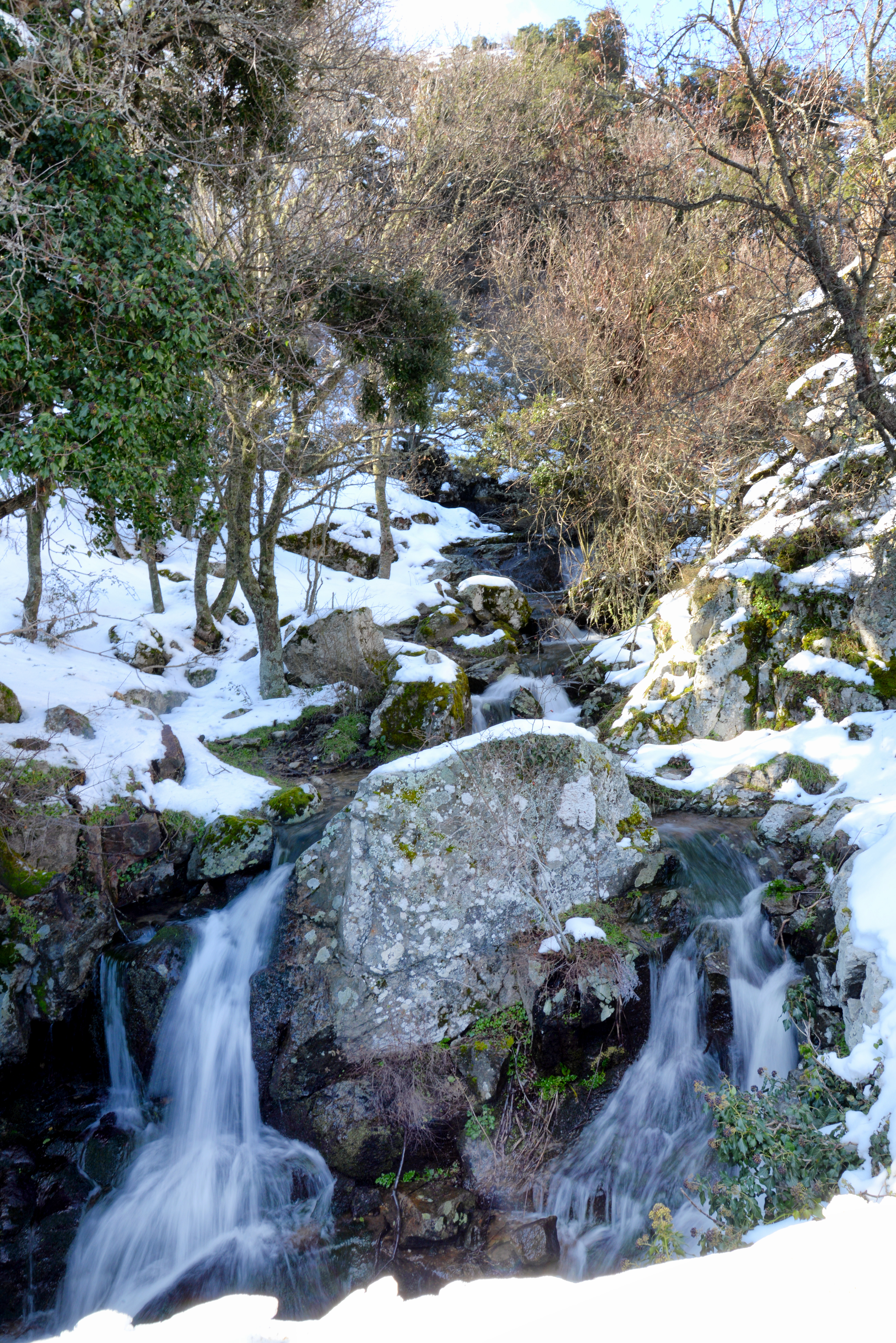 Olmi-Cappella, Giussani (Haute-Corse) - Le ruisseau di Forci, affluent de la Tartagine, en amont du pont de la RD 963 à la fontaine d'Ombrese.